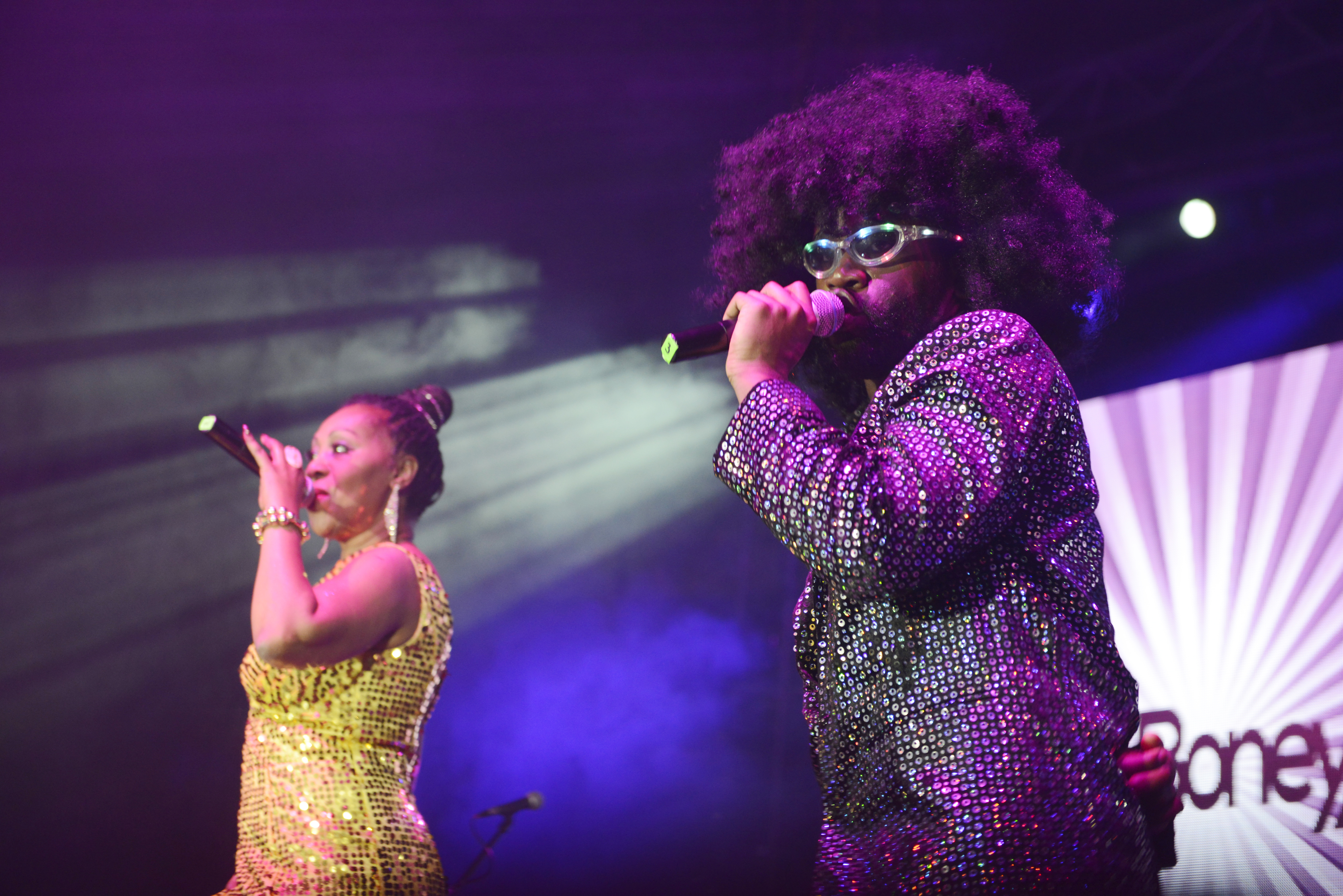 Boney M. (Bratislava, 2015)